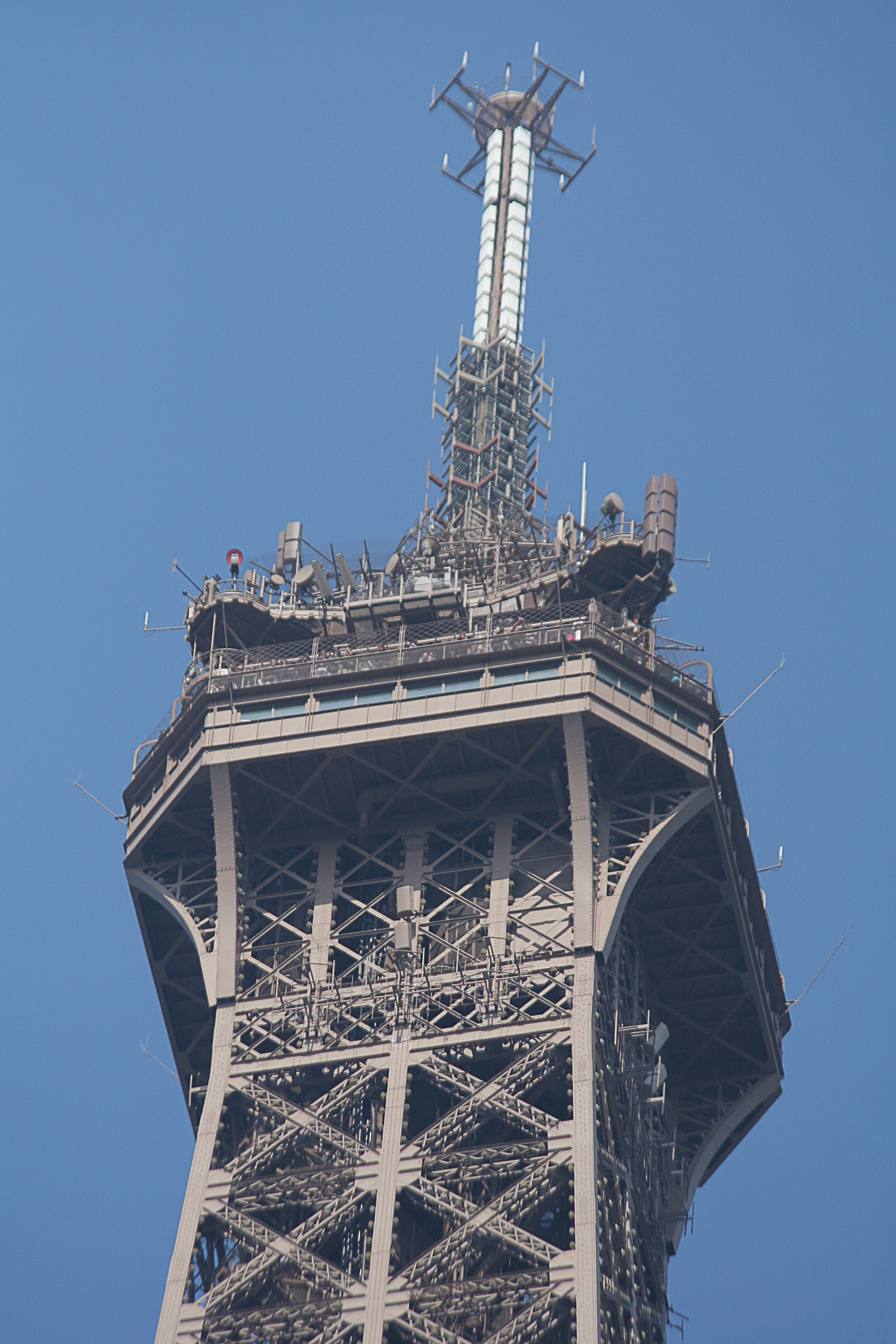 Antennes de la Tour Eiffel